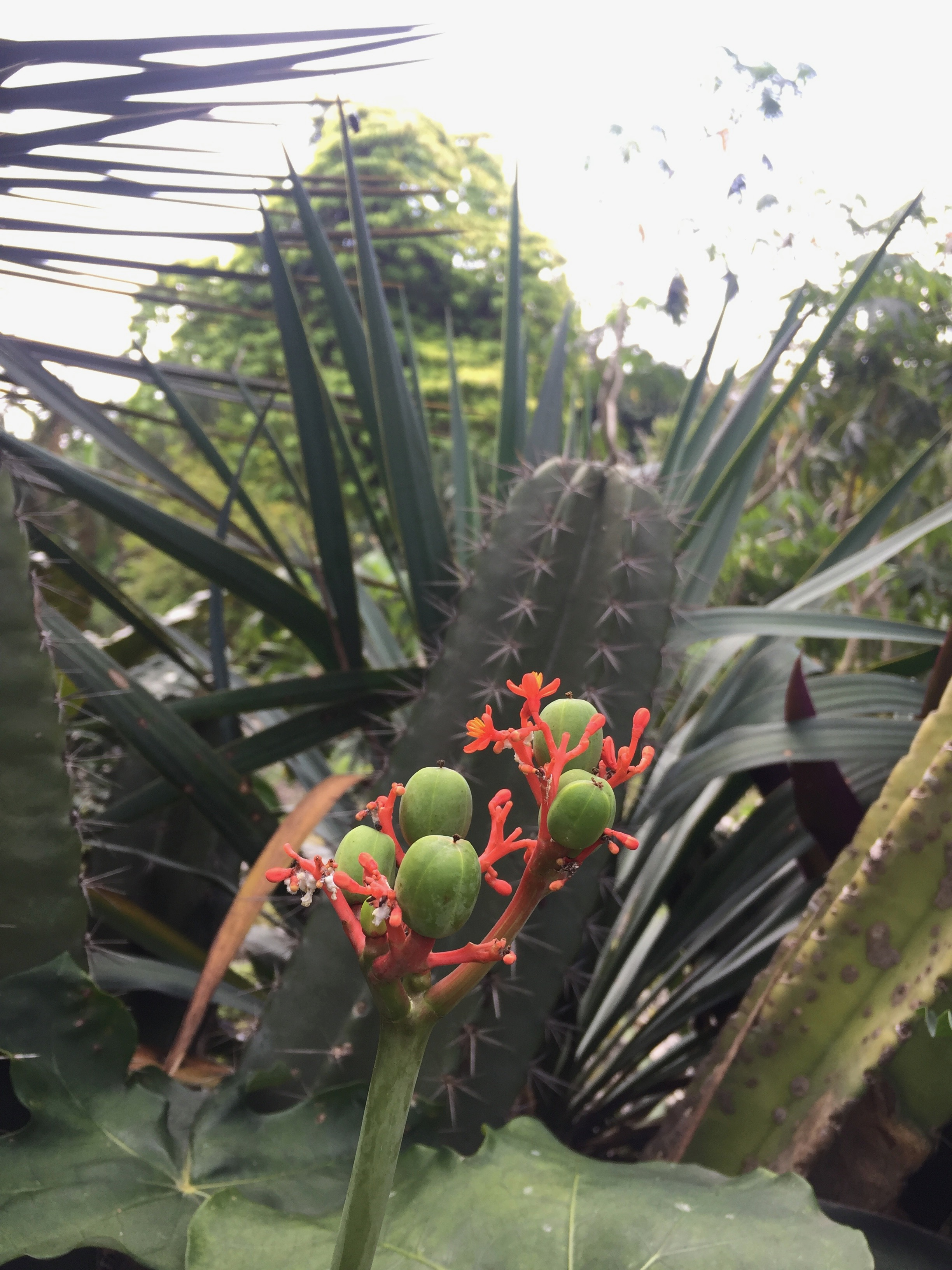 Sebuah tunas kaktus